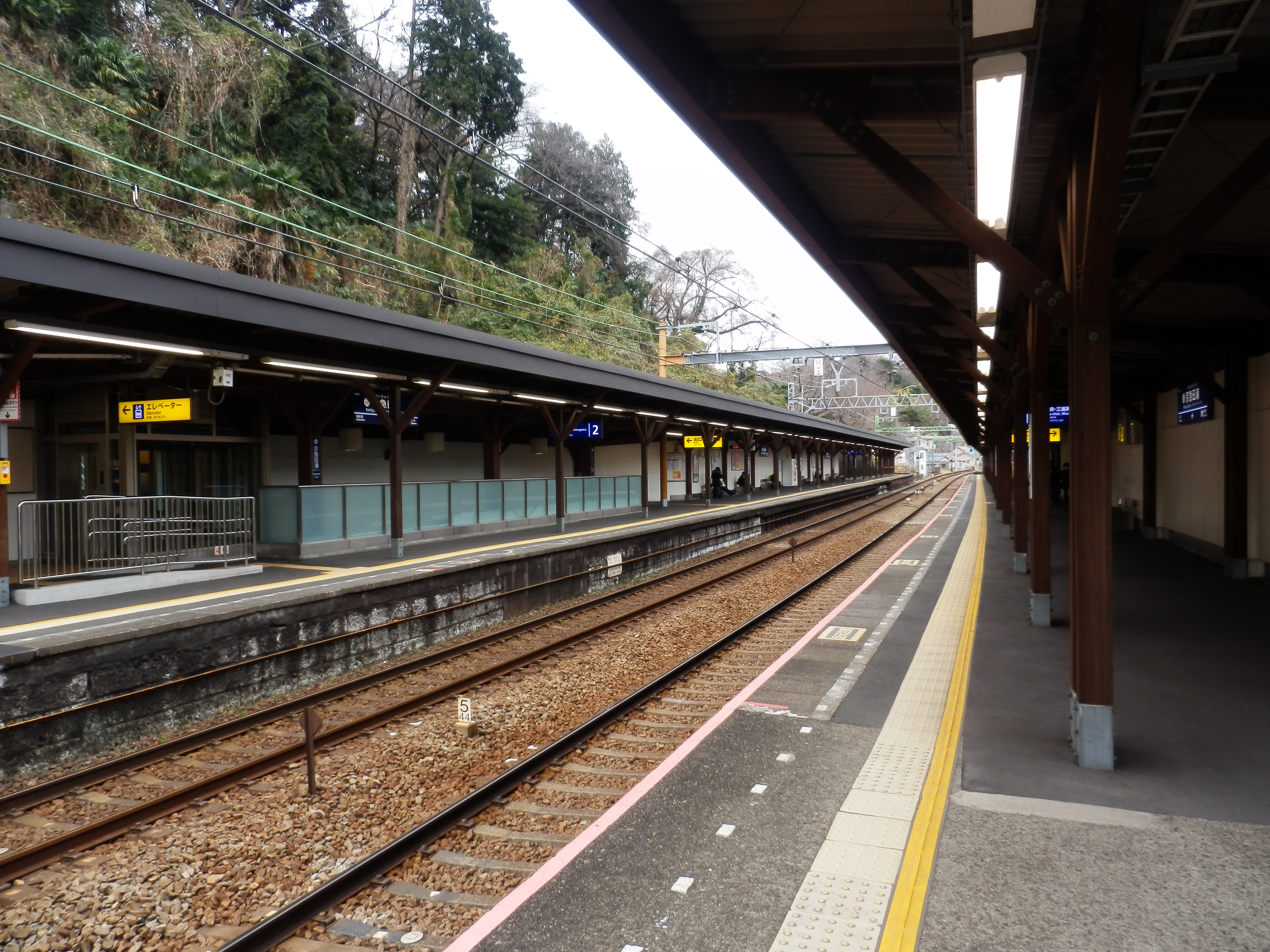 京急田浦駅ホーム